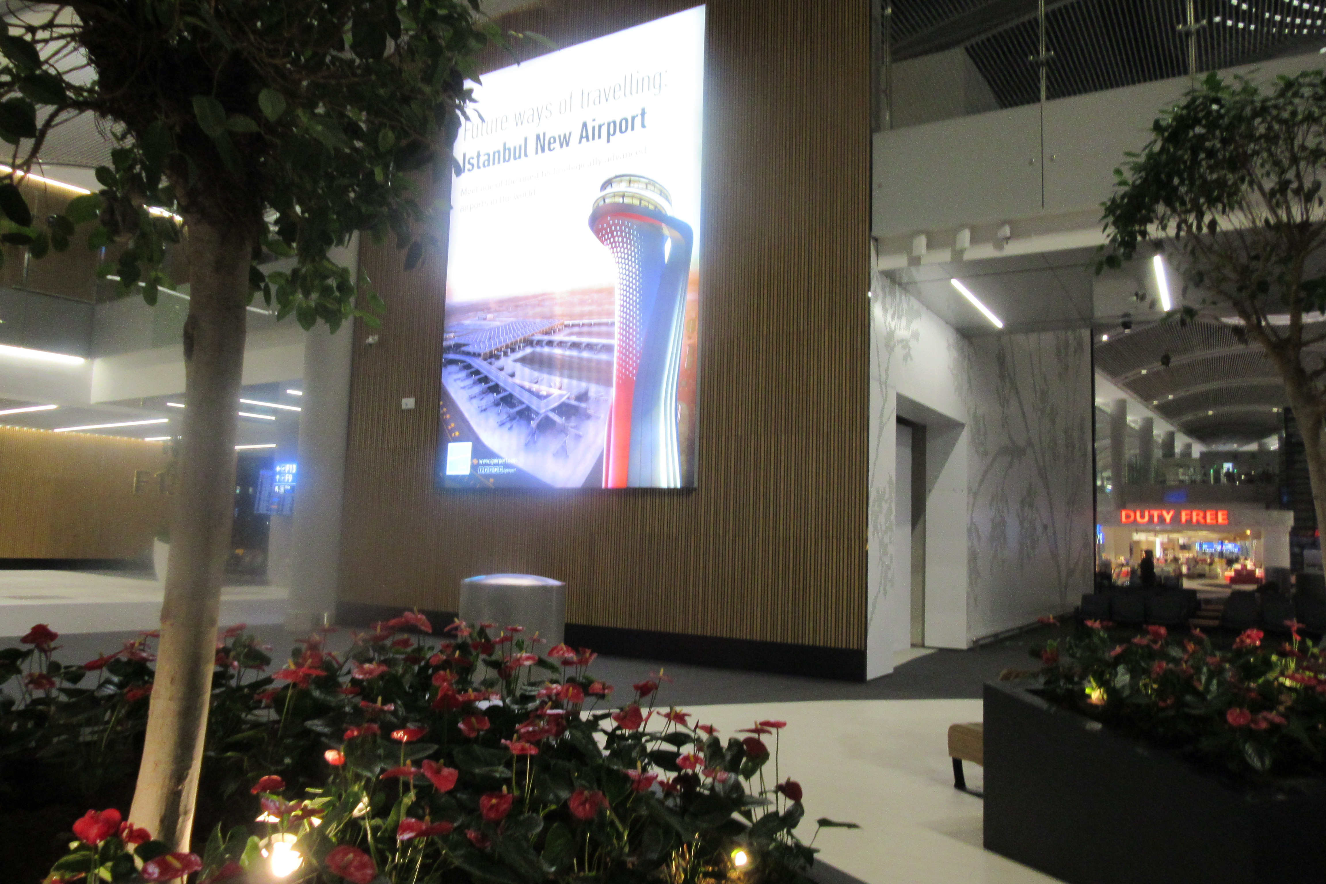 Интериор на Летище Истанбул